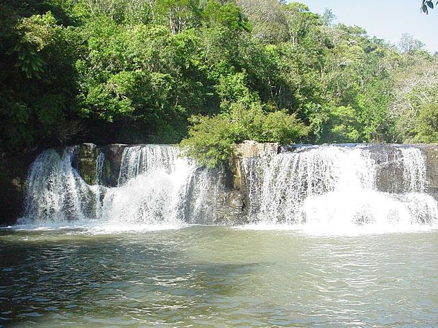 Cascata de Osório